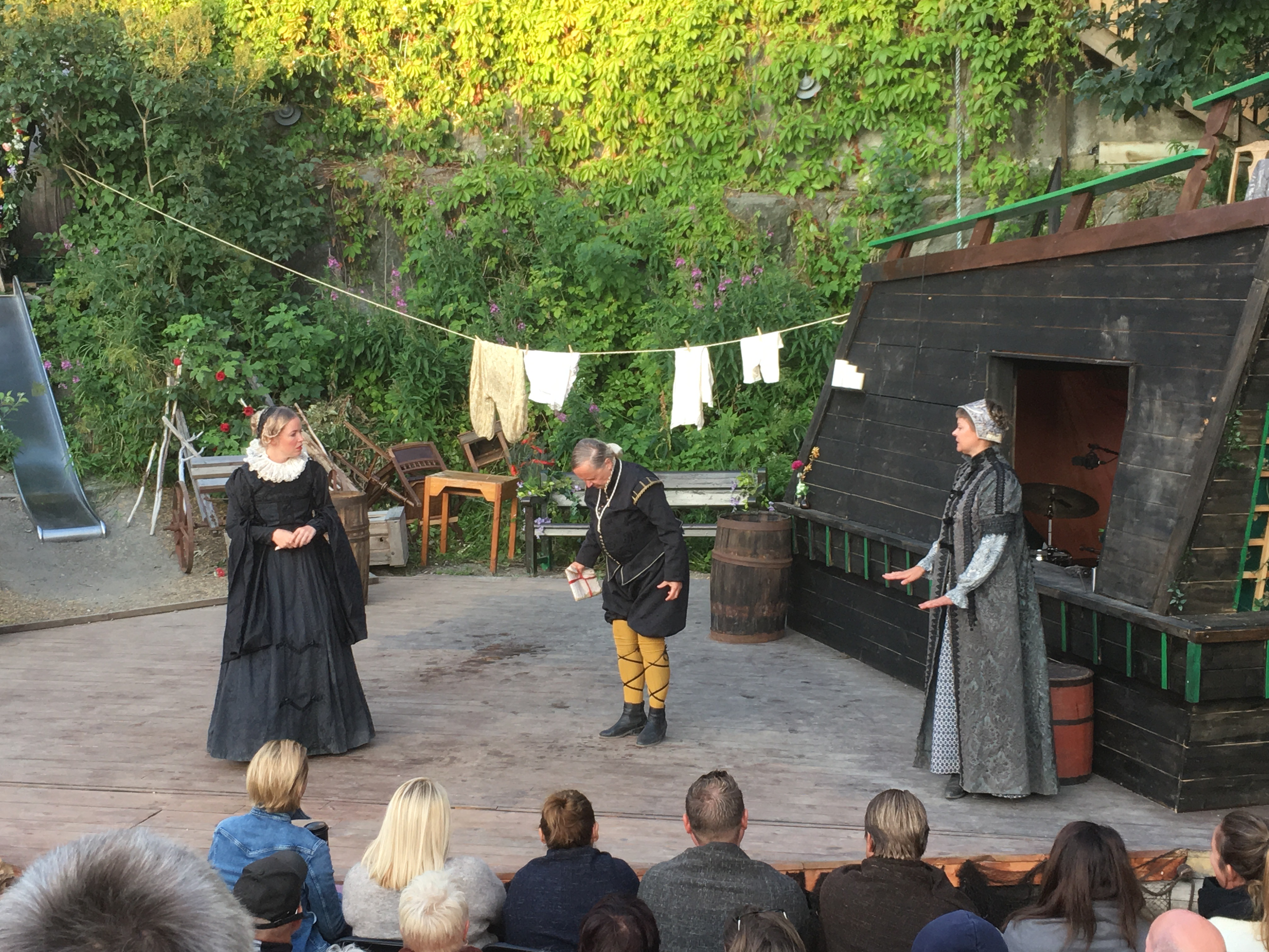 Fra Rabarbrateaterets sommerforestilling 2019: Trettendagskvelden (orig.: Twelfth night) av William Shakespeare. Gjendiktet til sparbumål av Hans Magnus Ystgaard. Fra venstre: Madeleine B. Nilsen, Marianne Meløy og Eva Næss